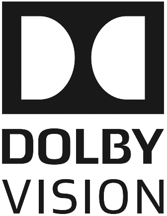 Logo von